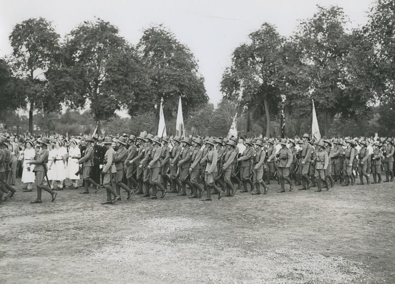 De twee detachementen van de Koloniale Reserve defileren tijdens de (eerste) vlaggenparade op de Wedren de maandagavond voor de 28e Vierdaagse.